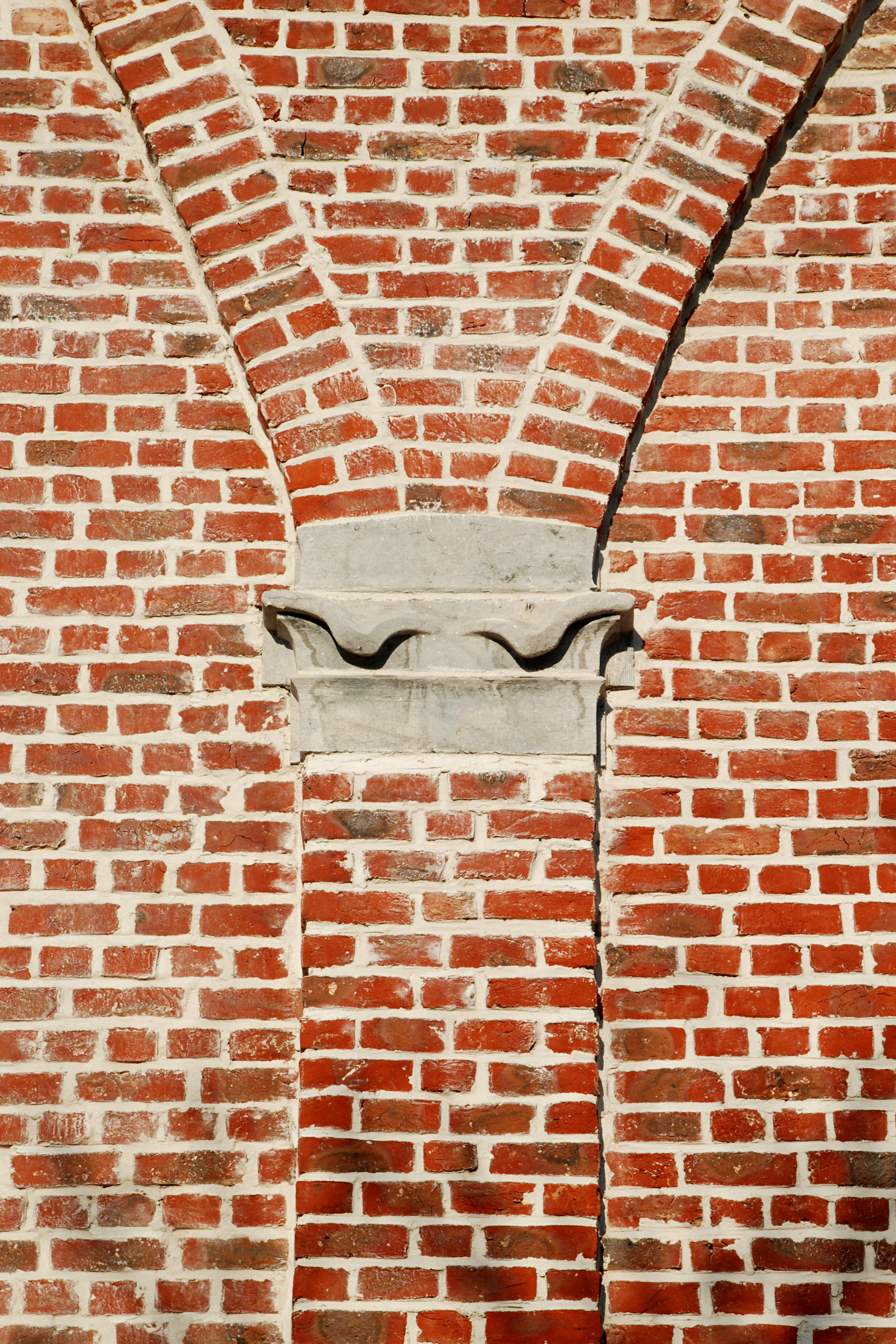 Belgique - Watermael - Entrepôt Van Cutsem (néo-gothique, architecte Albert Roosenboom, 1902)